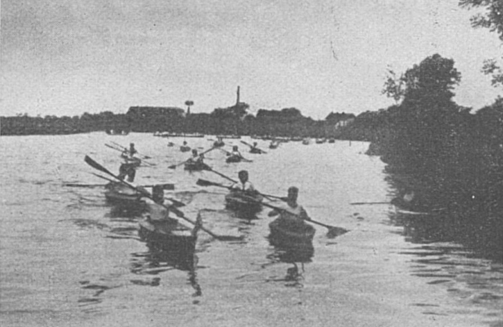 Kanusportler der Wassersportabteilung der Hamburger Turnerschaft von 1816 um 1926